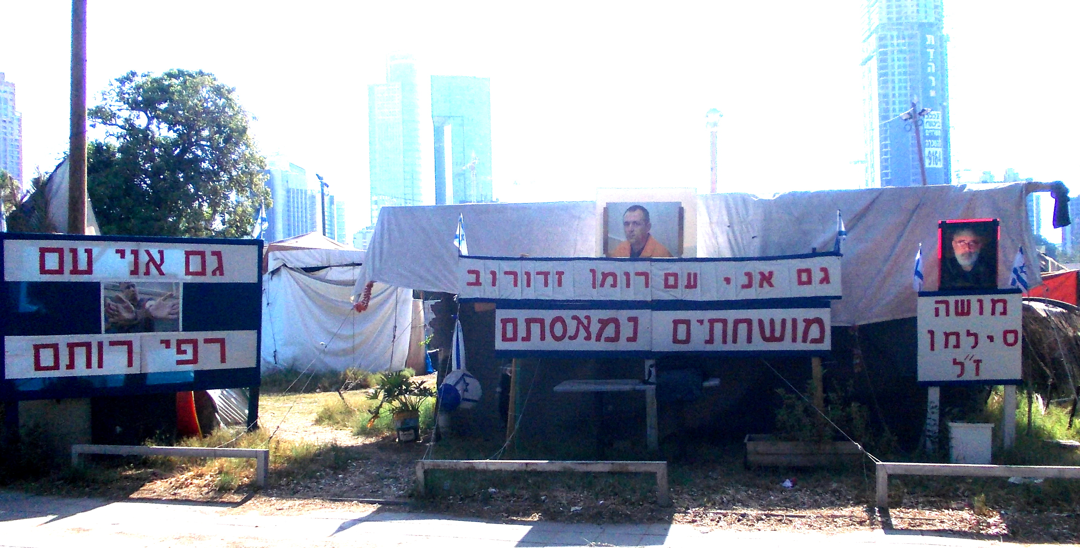 מאהל המחאה ת"א בגן וולובלסקי-קרני (ליד תחנת הרכבת ארלוזורוב) באוגוסט 2015. שלטי מחאה בפינת שחיתות השופטים מתייחסים למקרים של רומן זדורוב - שמומחים אומרים הורשע הרשעת שווא ברצח, רפי רותם - חושף השחיתויות ברשות המסים, הנאשם בהליכים פליליים על העלבת עובדי ציבור בזמן זה, ומשה סילמן ז"ל - שהיה קרבן לשיבוש הליכי משפט, ודרכו לצדק נחסמה בתביעתו נגד ביטוח לאומי, כפי שציין בפתח מכתבו האחרון.